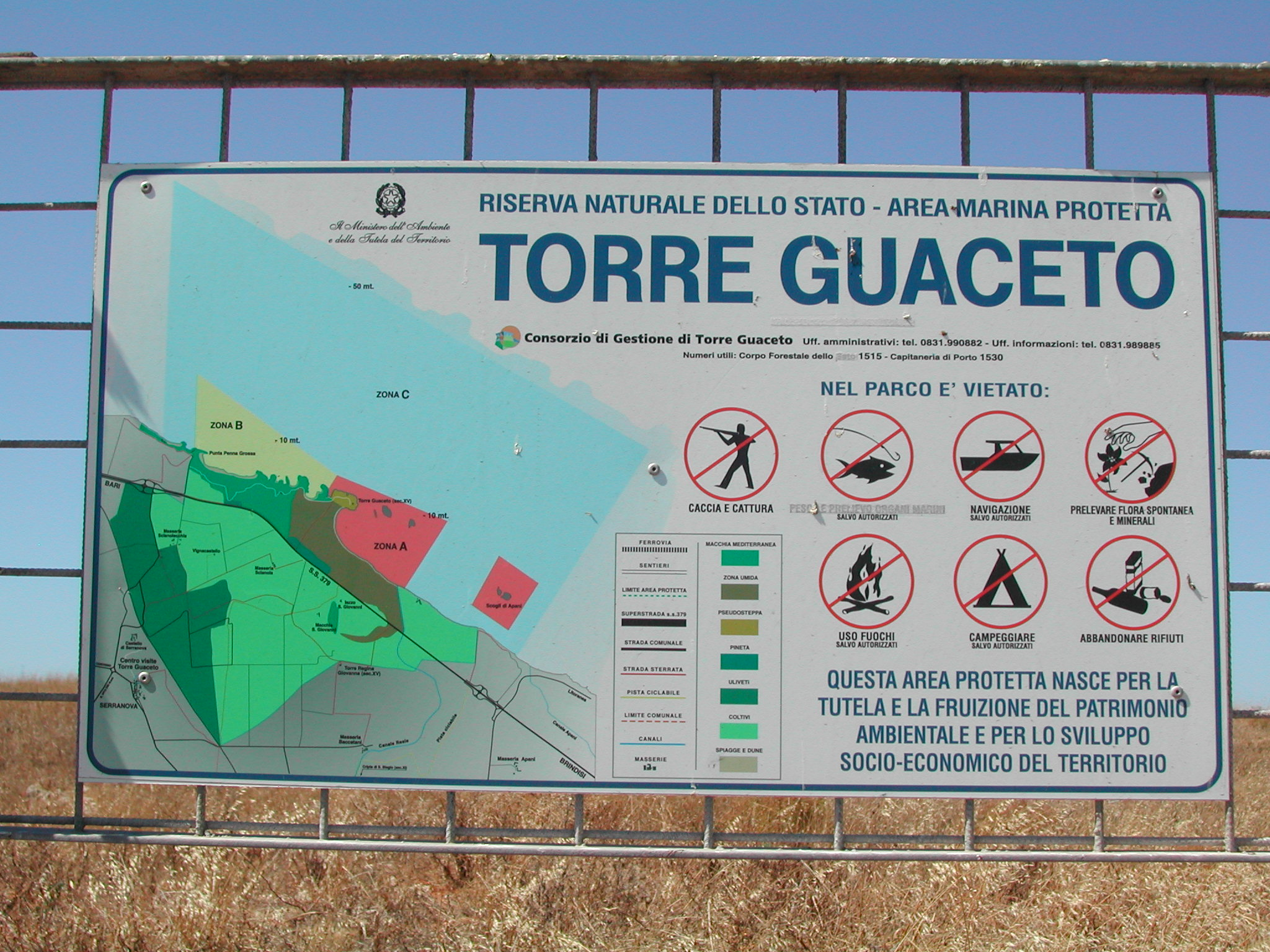 Riserva di Torre Guaceto, 2003 - Mappa del sito